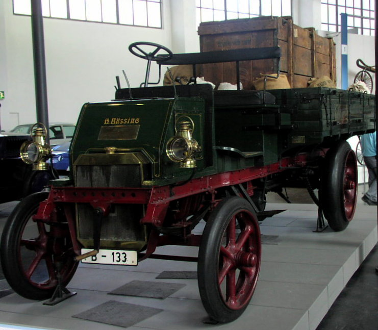 Büssing ZU-550 Truck. Bj. 1903, 2370 ccm, 2 Zyl., 9 PS, 3 t Nutzl.